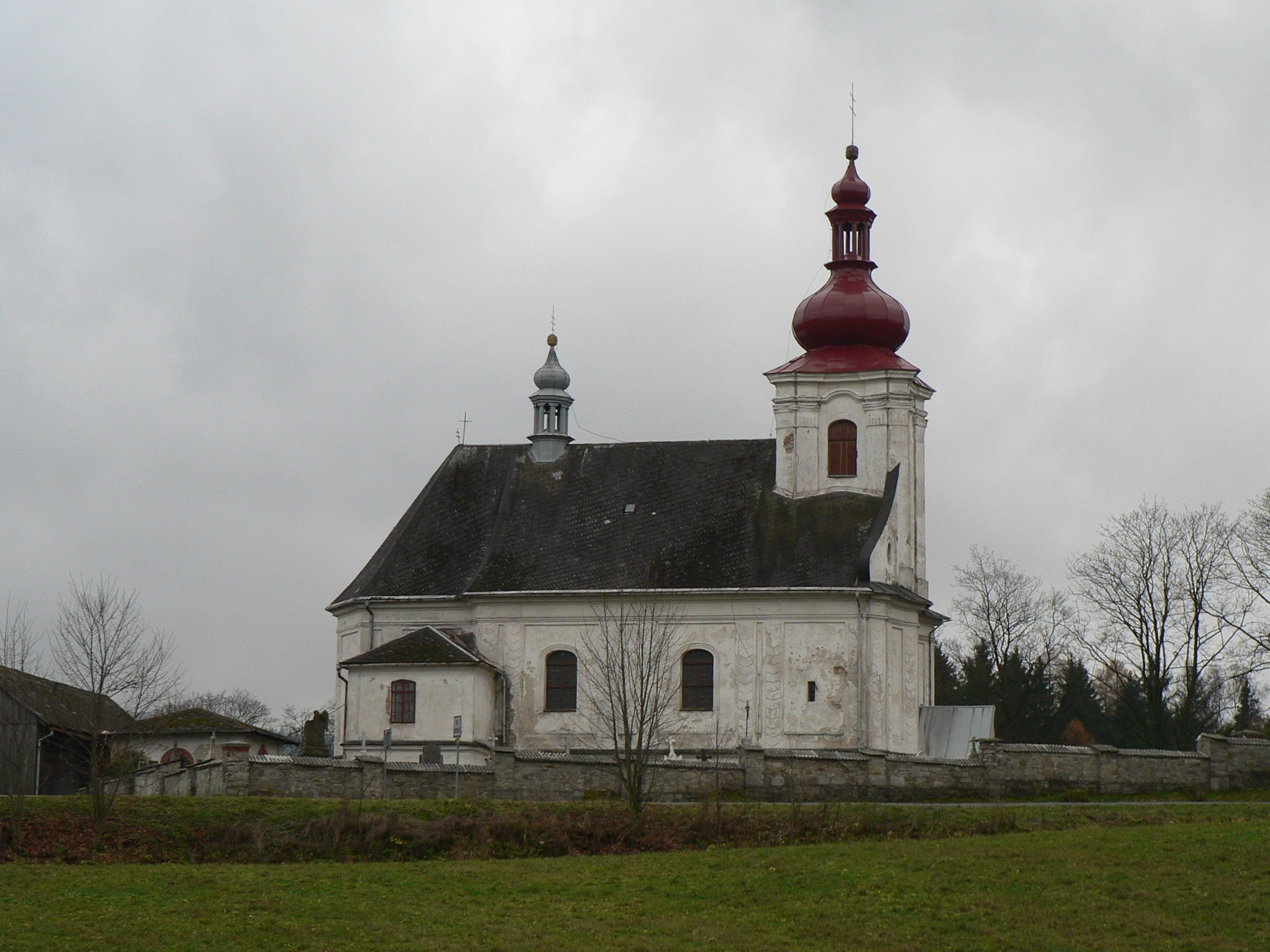 Kostel svaté Máří Magdalény (Pusté Žibřidovice)